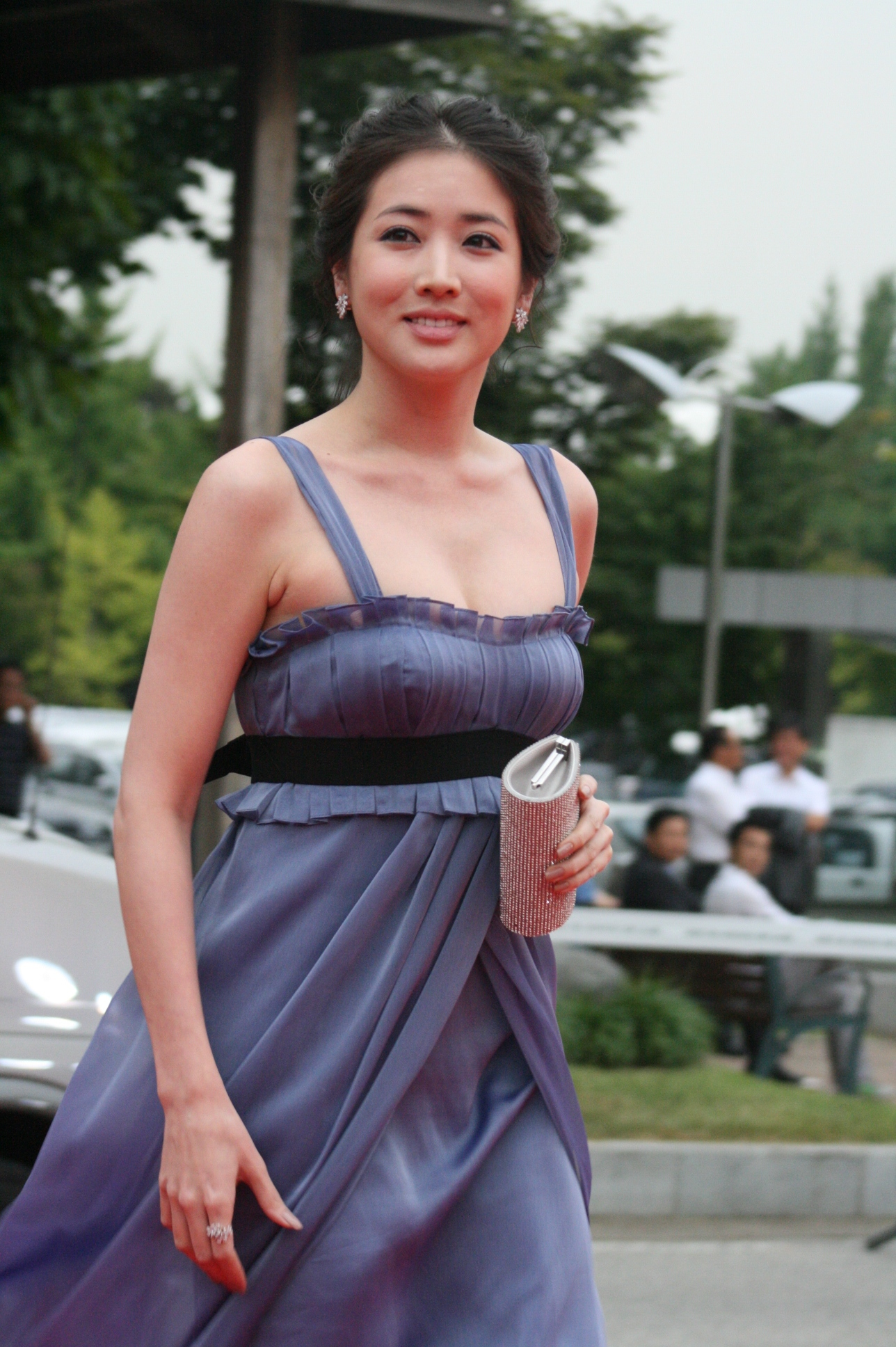 2009 서울 드라마 어워즈